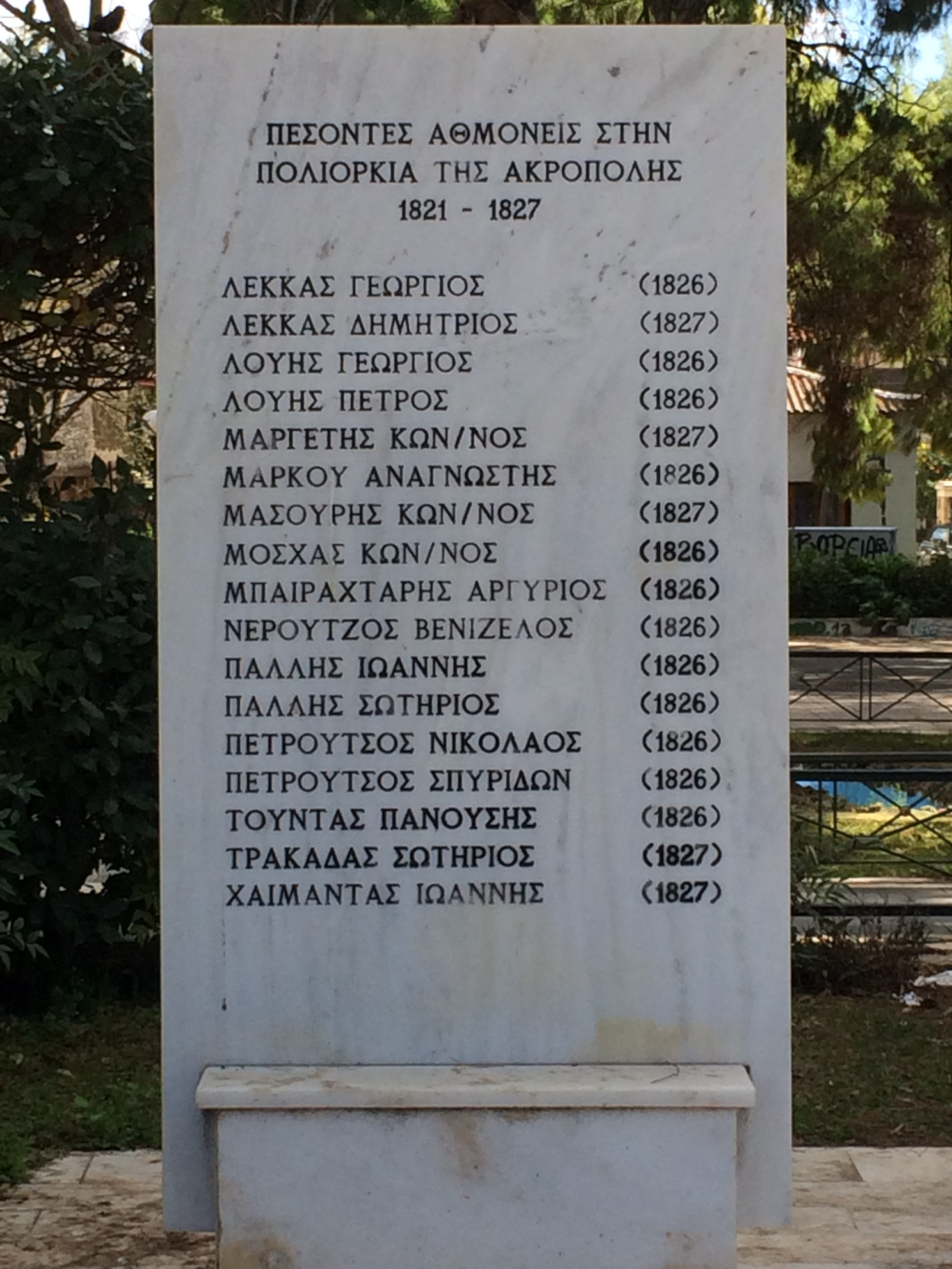 Πεσόντες Αθμονείς στην Πολιορκία της Ακρόπολης 1821-1827